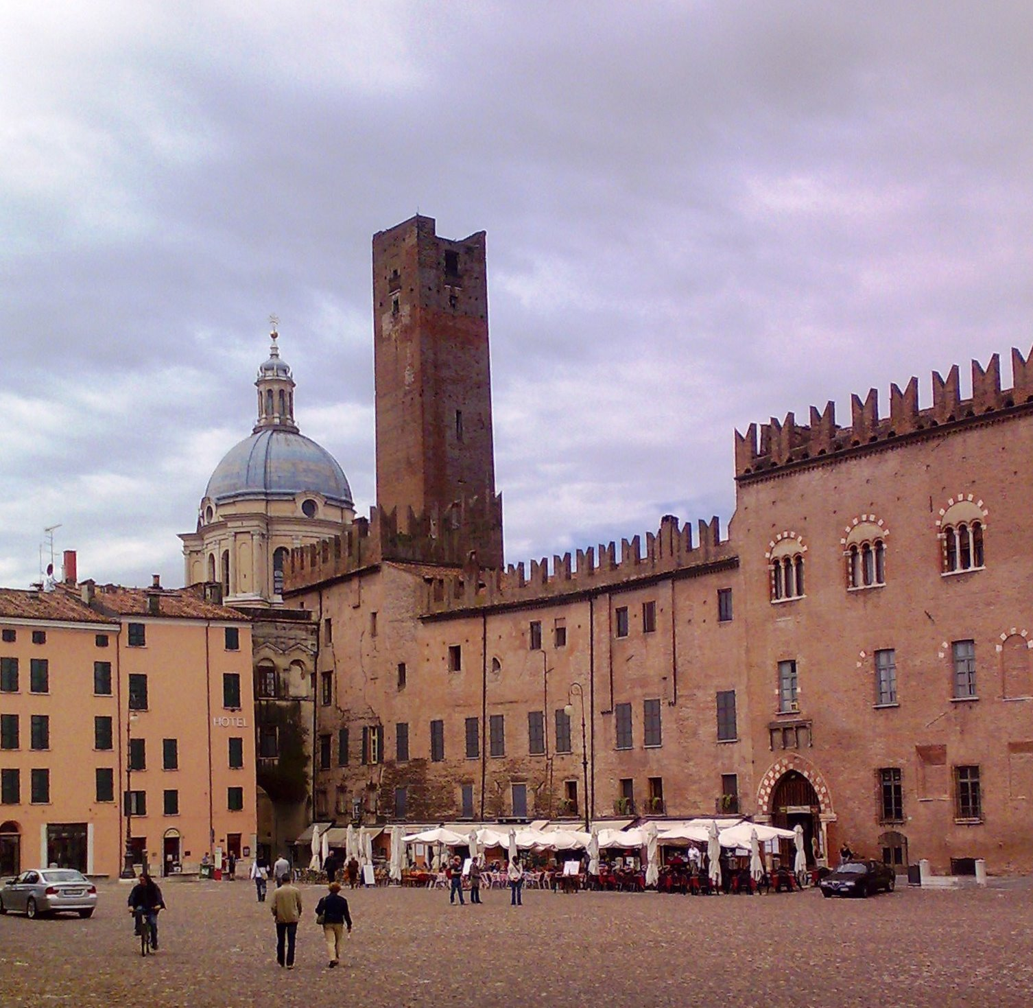 Mantova oazza Sordello